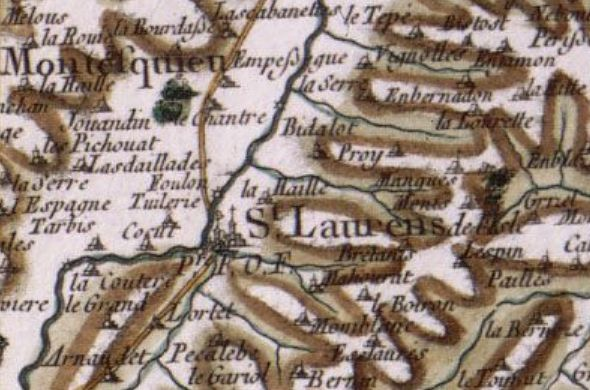 Saint-Laurent, commune de la Haute-Garonne (31), figuré sur une carte de Cassini sous le nom de "Saint-Laurens de l'Isle" en 1770 Numérotation Cassini : 75 Numéro de parution : 98ème feuille (Tarbes) Dimension de la feuille : 60,5 x 95,5 cm Levés réalisés par Langelay (Ingénieur) et vérifiés par La Briffe (Ingénieur) Echelle 1/86400e